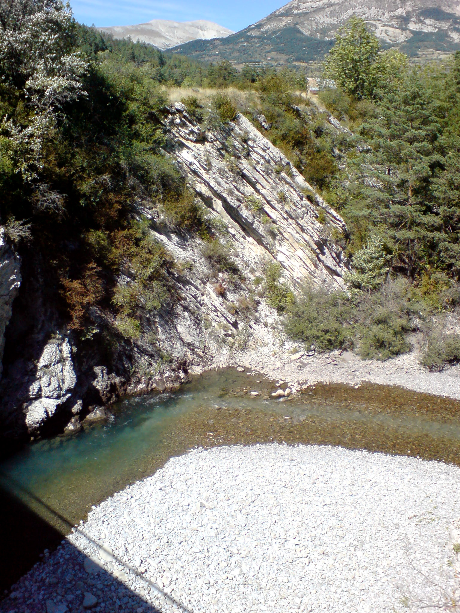 Vu au pont sur le Verdon de la D 908a